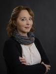 Katriina Järvisen valokuva.